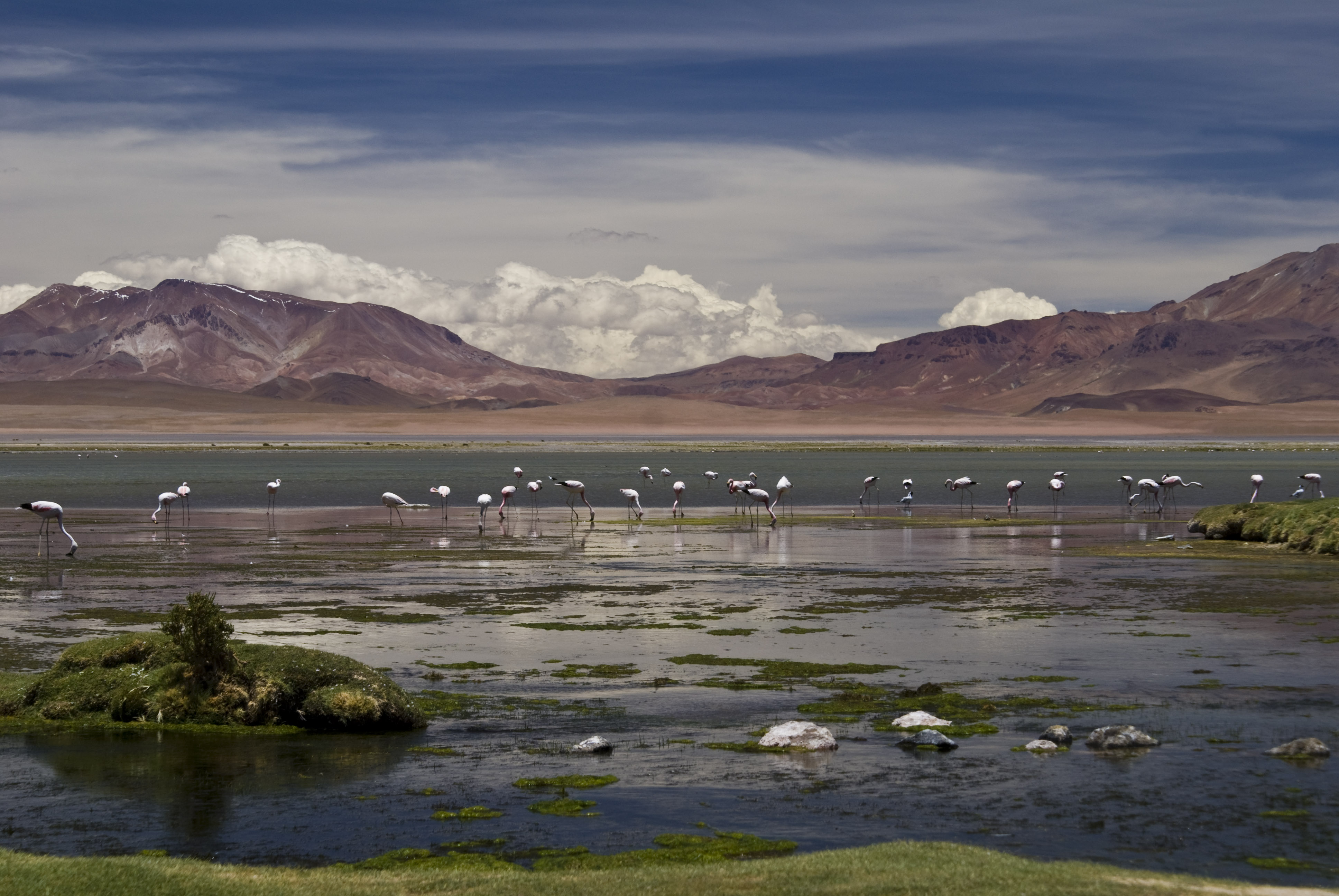 Salar de Tara, Los Flamencos National Reserve, Chile.